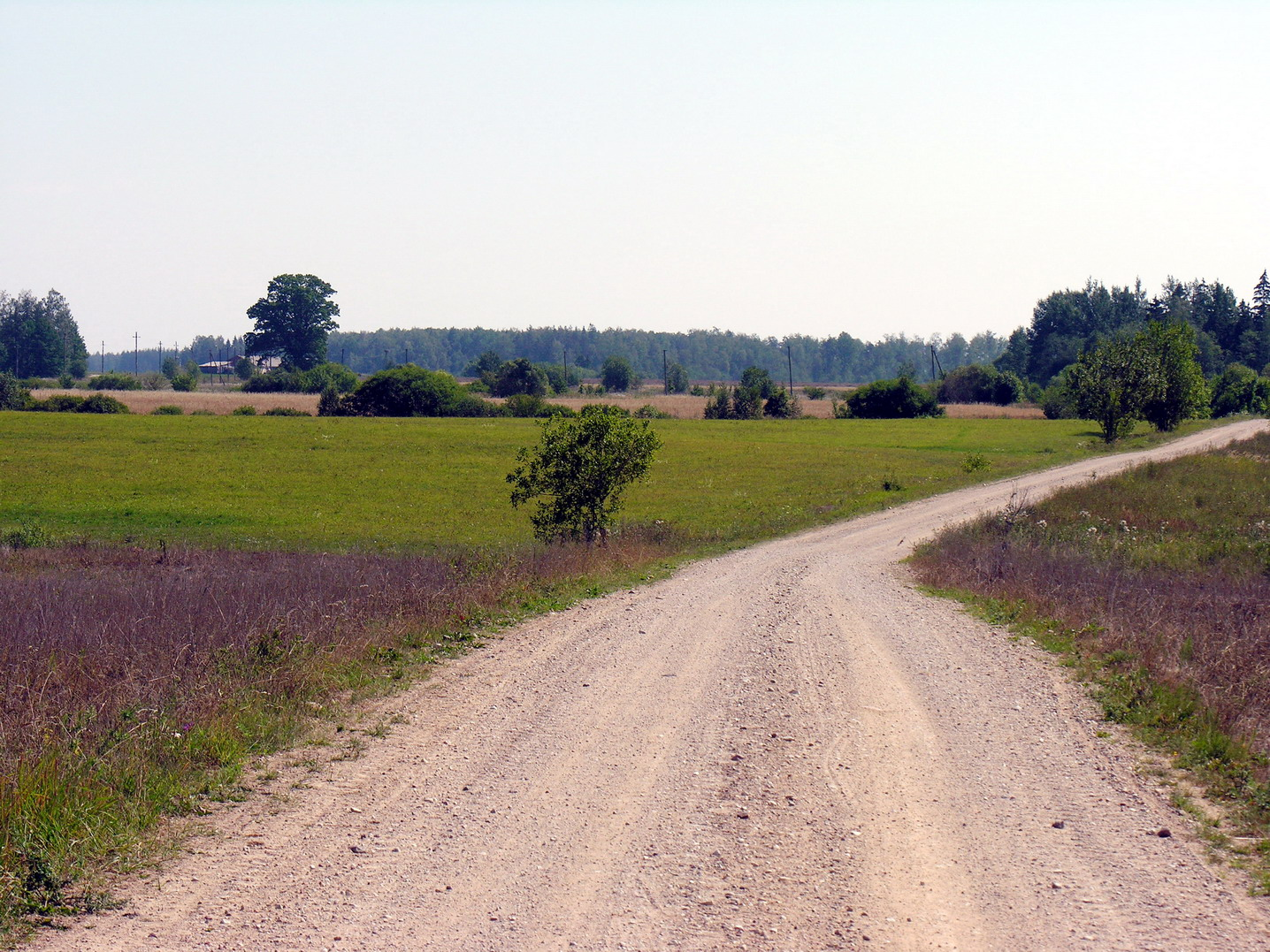 Marškonė, Mažeikių raj., Viekšnių sen. Foto: Algirdas, 2006 m. rugpjūčio 11 d., Lietuva